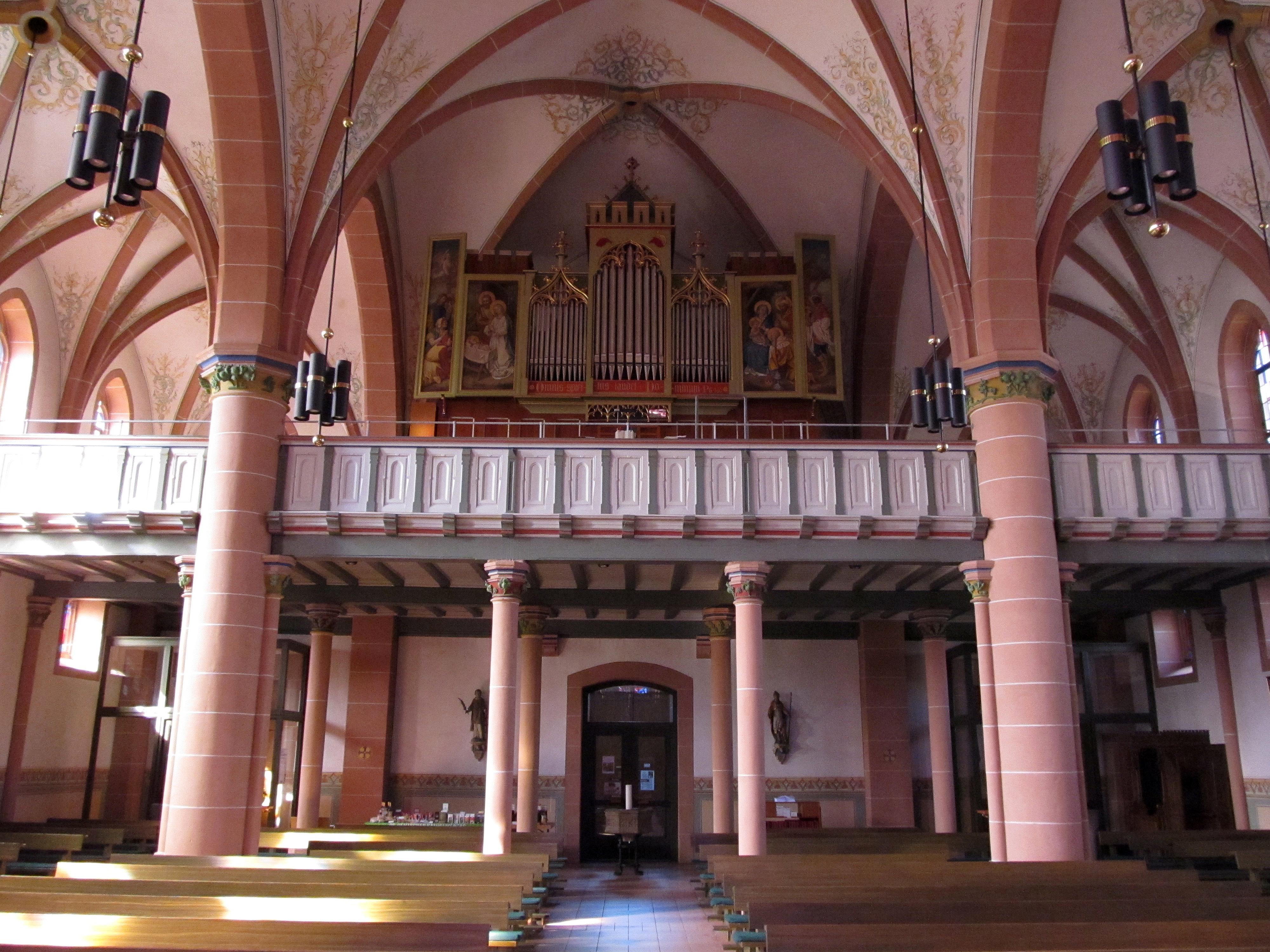 Orgelempore der katholischen Pfarrkirche St. Michael in Wemmetsweiler, Gemeinde Merchweiler, Saarland